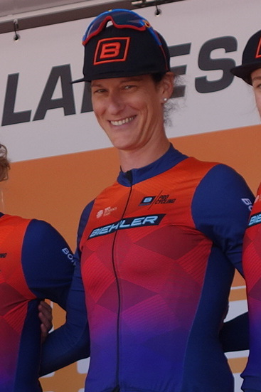 Natalie van Gogh (Biehler) bij de start van de eerste etappe van Stramproy naar Weert in de Boels Ladies Tour 2019